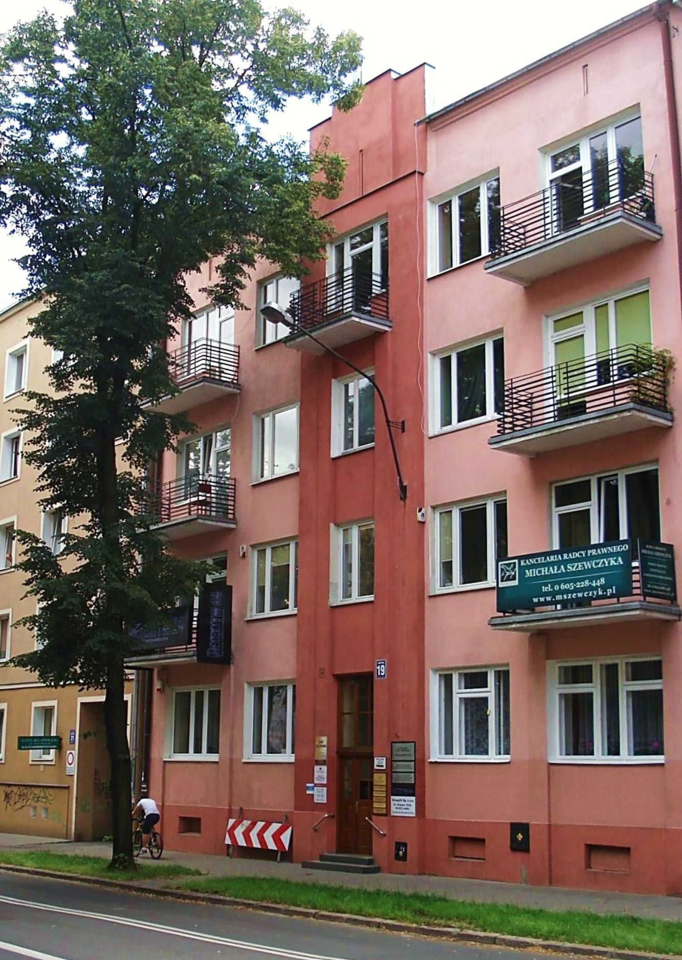 Kamienica przy ul. Chopina 19, Lublin – proj. A. Gruchalski